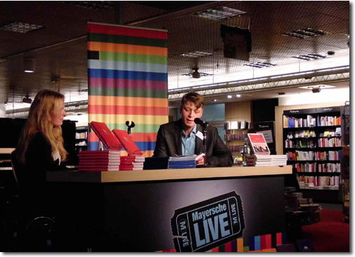 Autor Christoph Driessen während einer Lesung in der Mayerschen Buchhandlung in Köln 2015.